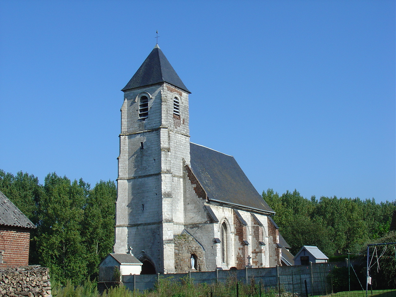 Église de Wavrans-sur-Ternoise